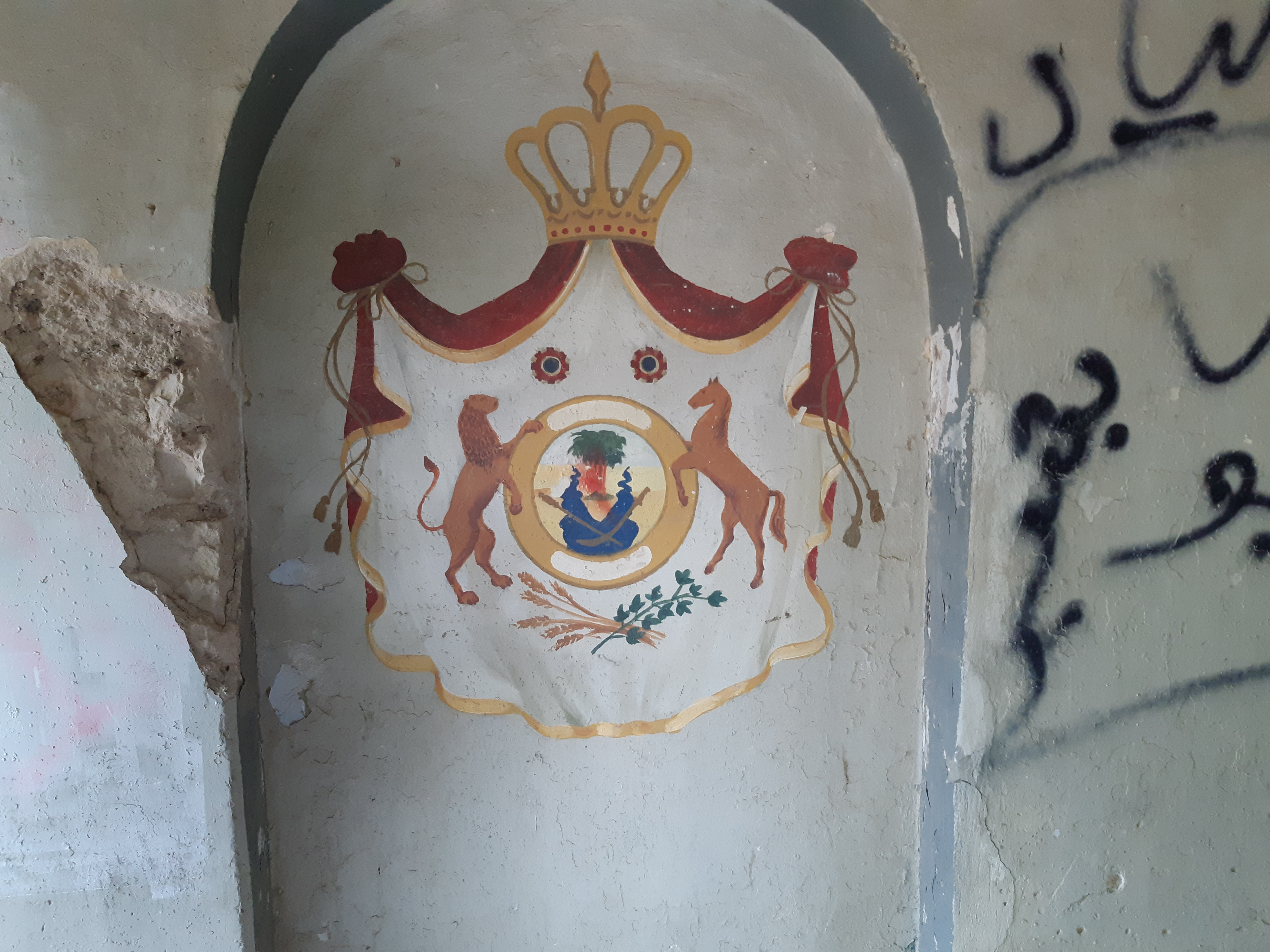 משטרת אבו גוש - סמל היחידה הבריטית